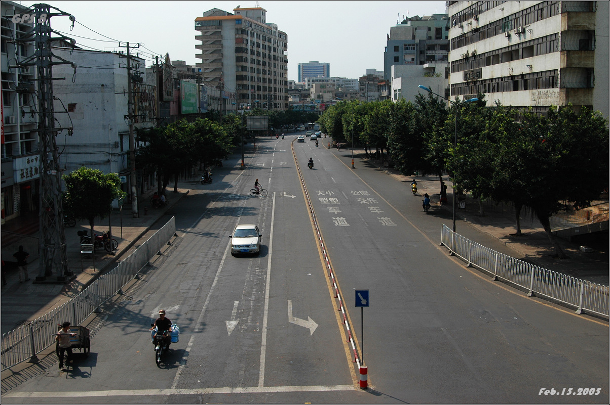 和平南路2005